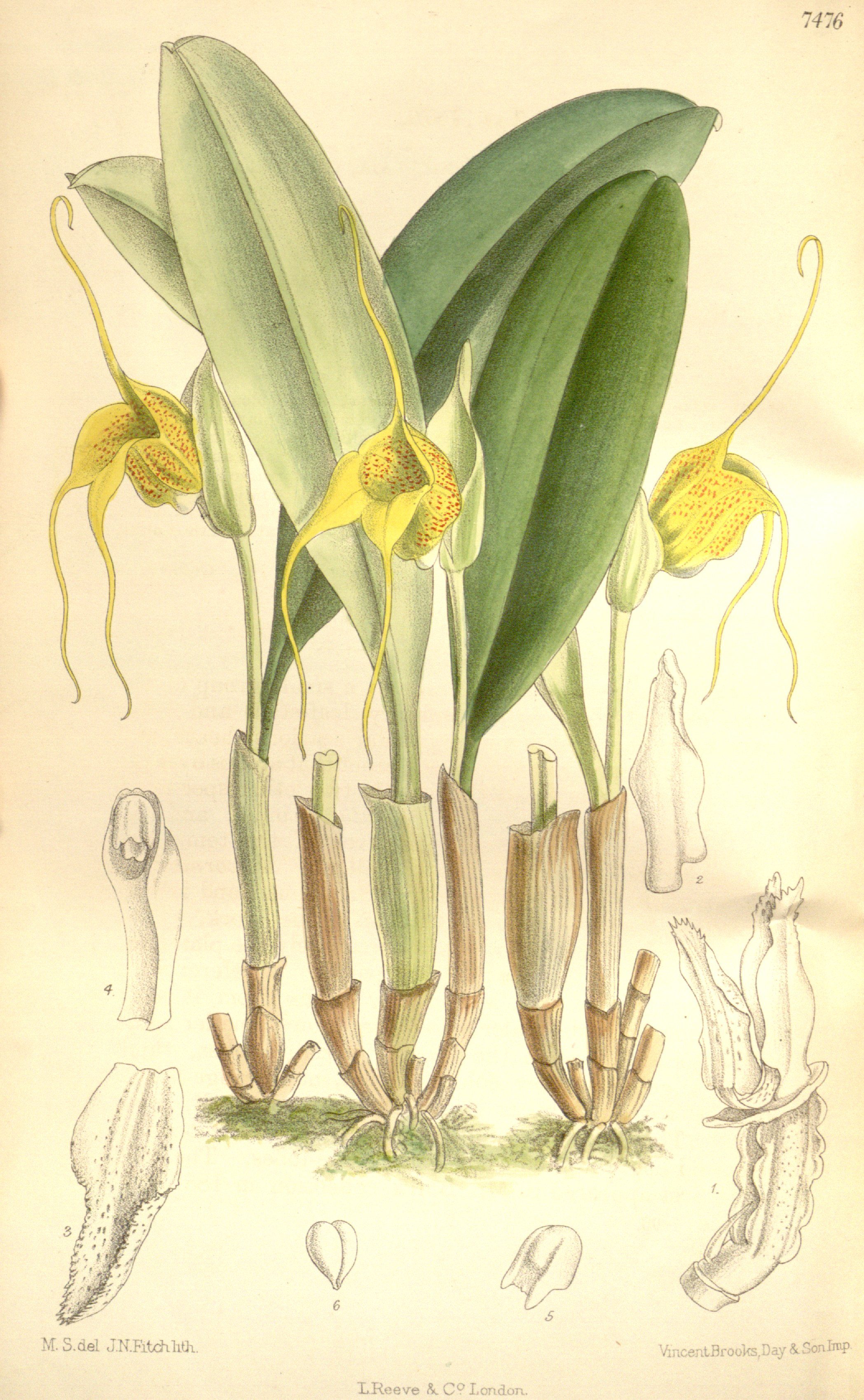 Illustration of Masdevallia corniculata (as syn. Masdevallia corniculata var. inflata)